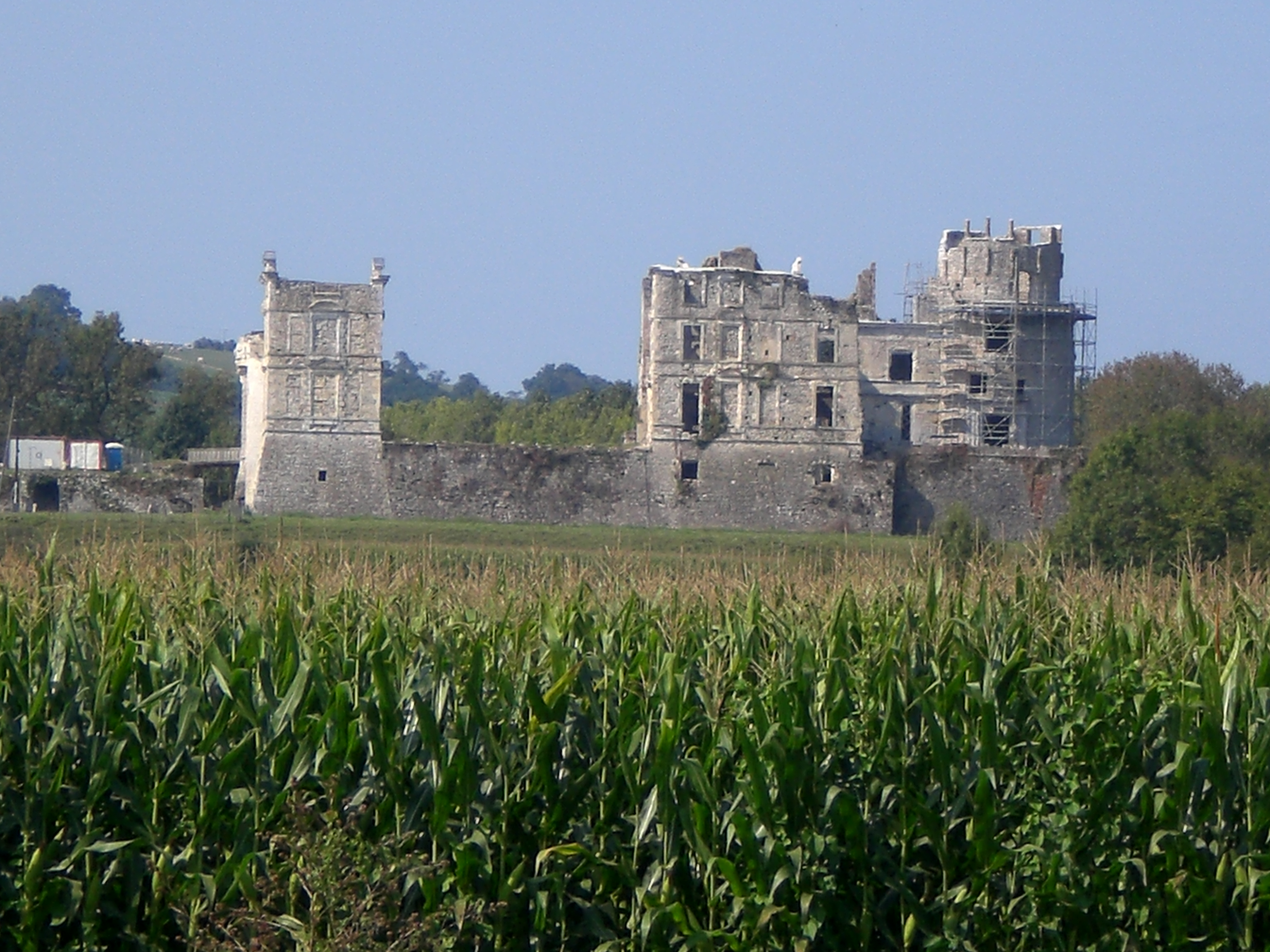 Agramondarren gazteluaren argazkia.